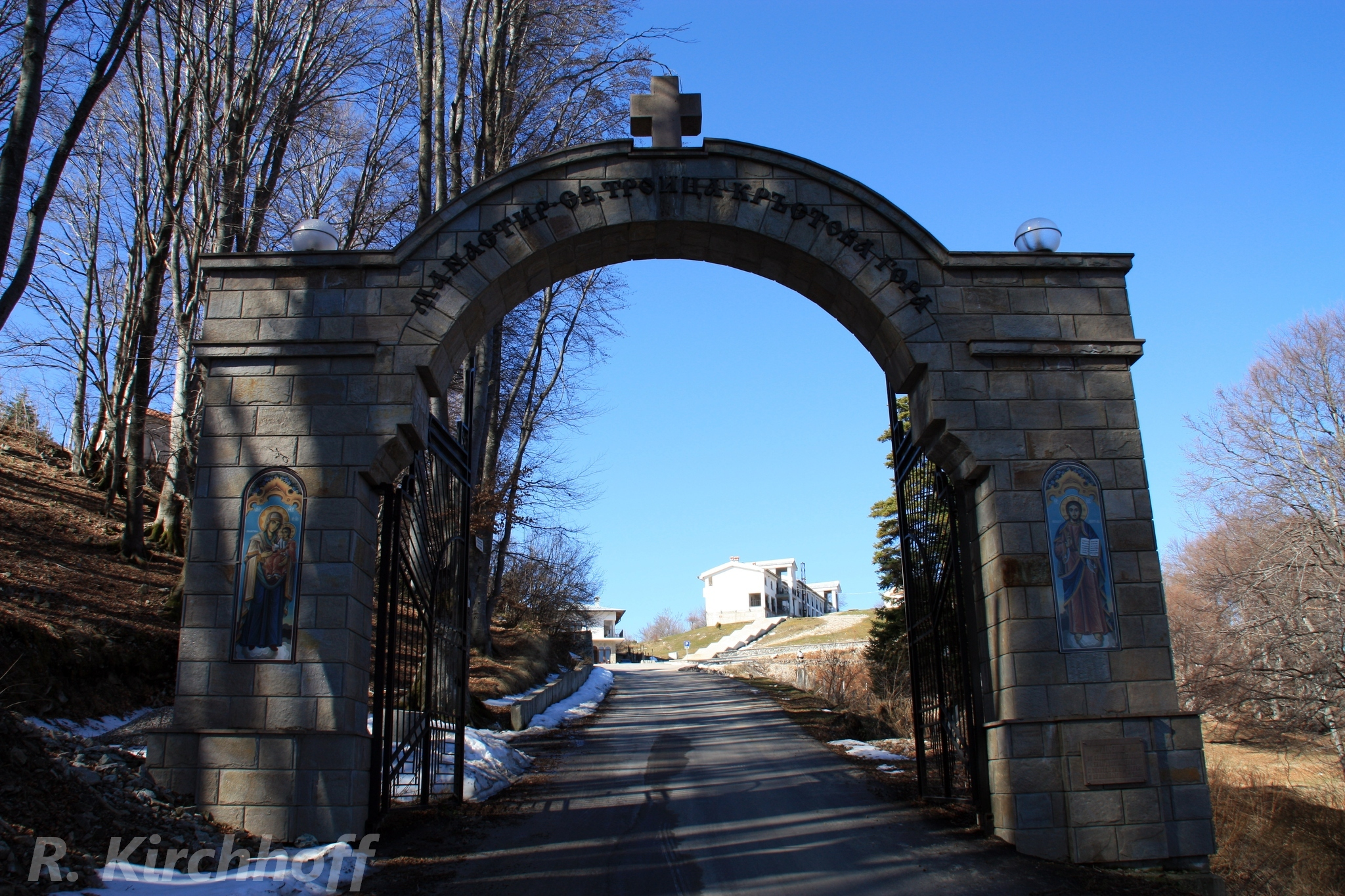 Eingang zum Dreifaltigkeitskloster Krastowa Gora mit der Ikone Maria mit Jesus im Arm (links im Bild) und Jesus (rechts im Bild).